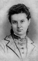 Felix Téver (1852 - 1932), Česká spisovatelka.